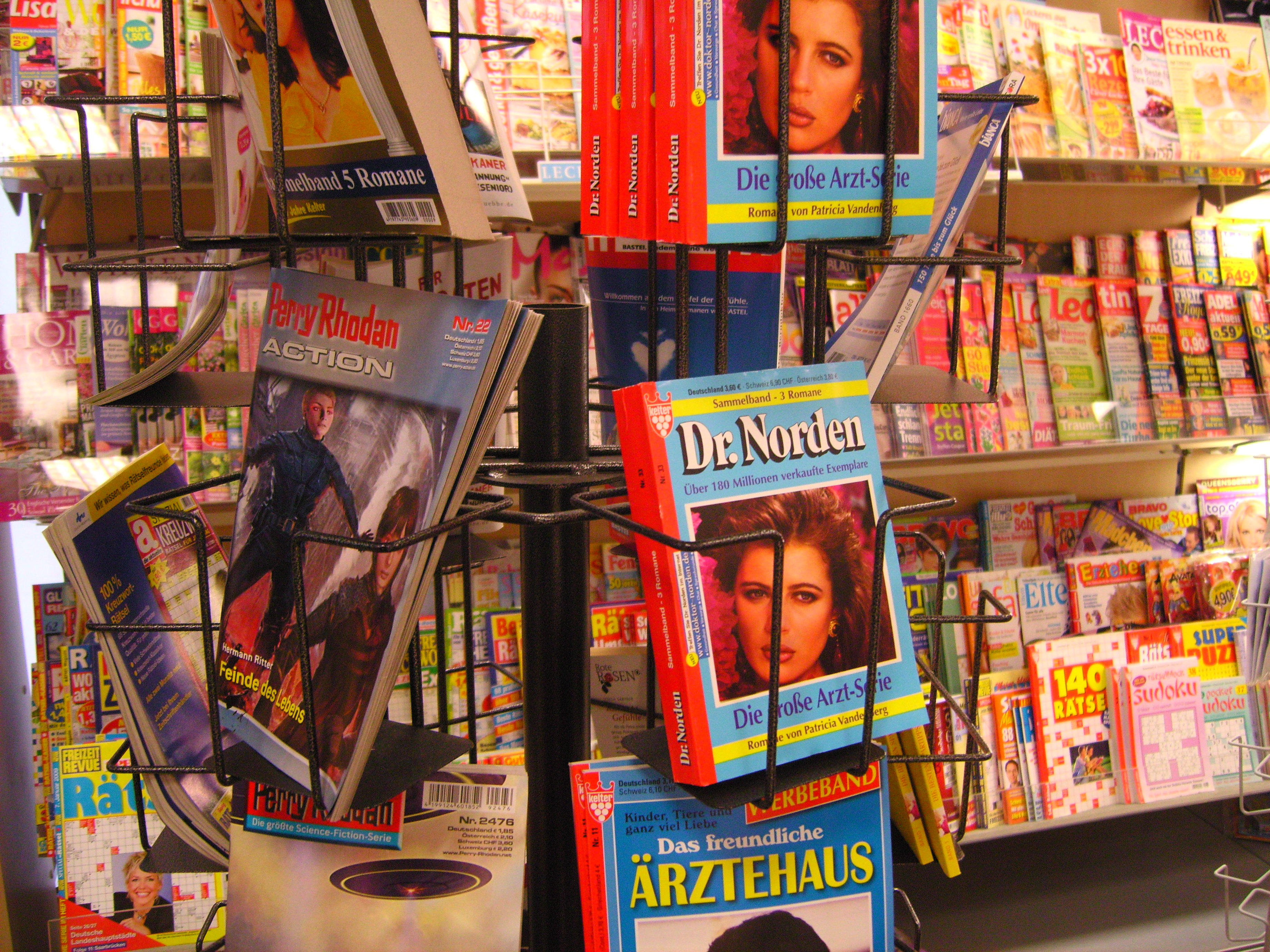 Groschenromane im Angebot des Zeitungsladens im Combi Supermarkt, Ammerländer Heerstraße, Oldenburg (Oldenburg)